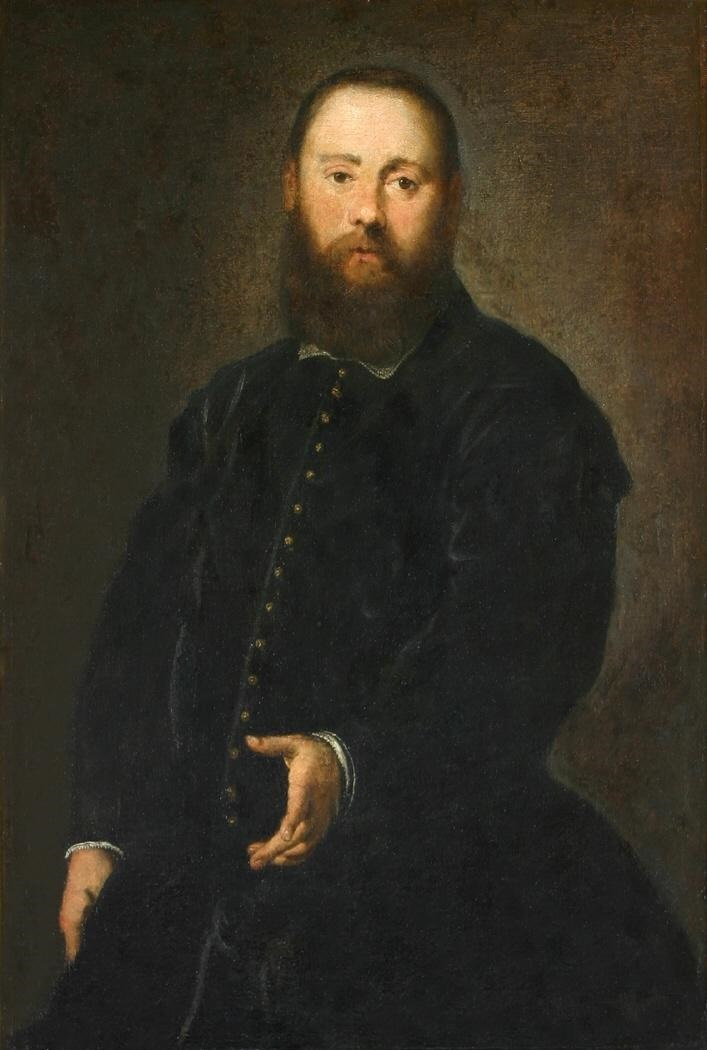 Posible retrato de Agostino Doria (1540-1607), que fue el 83º dogo de la República de Génova.